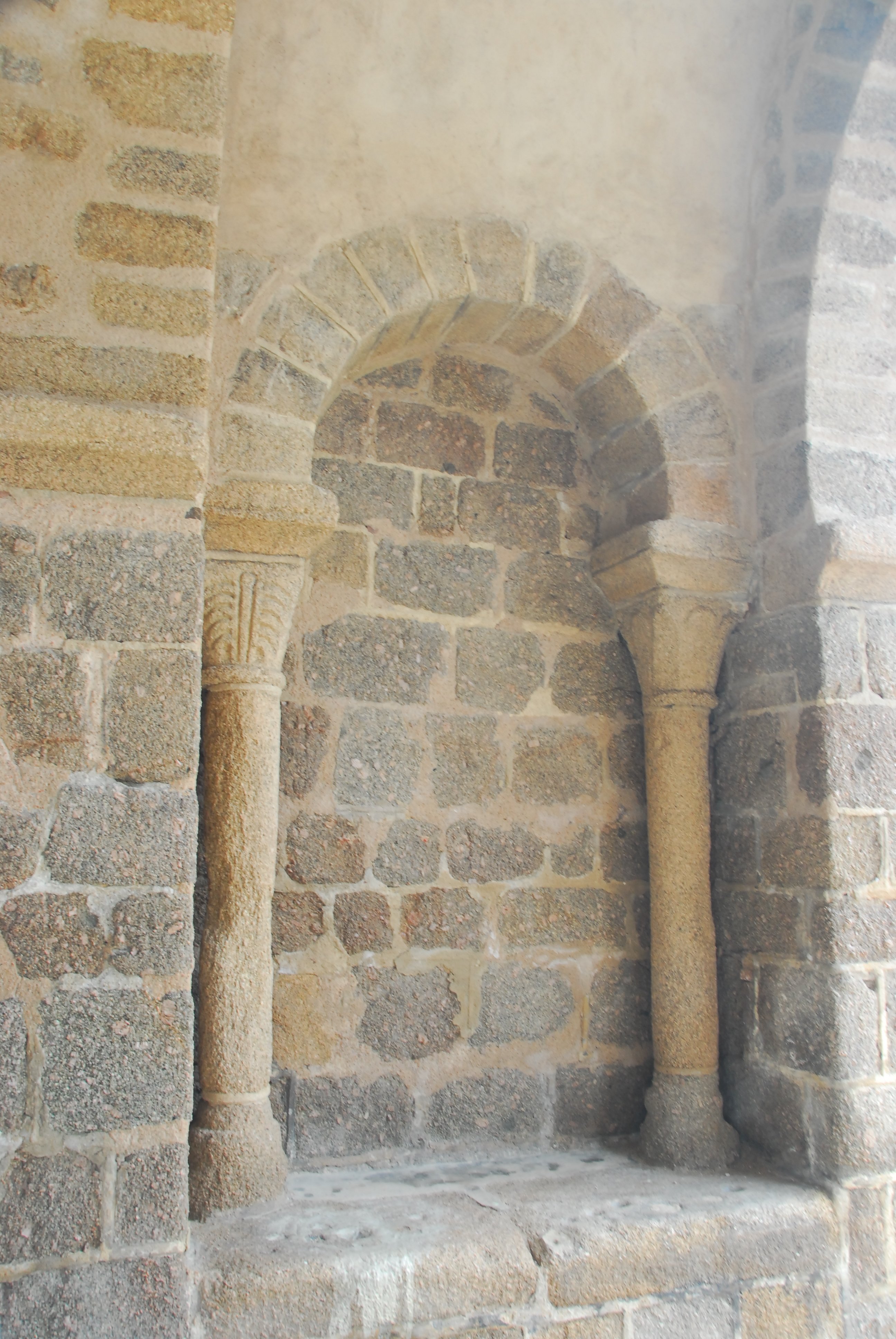 N.-D. de Châtel-Montagne, Kopfwand südl. Seitenschiff